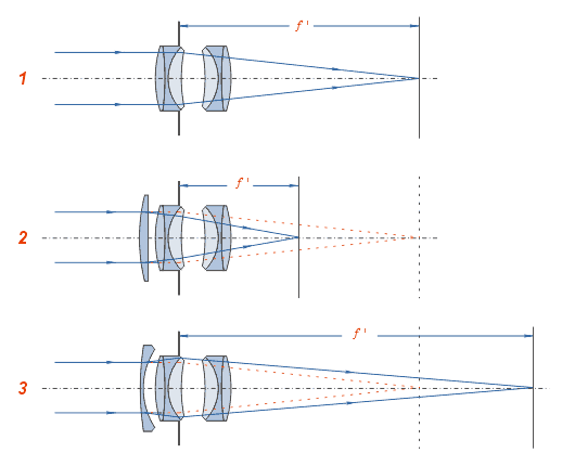 Object